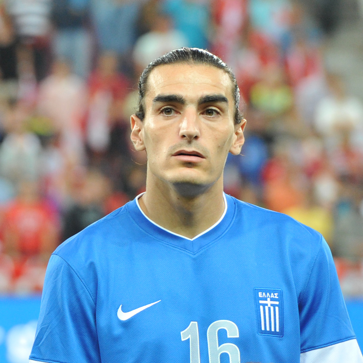 Freundschaftliches Länderspiel Österreich - Griechenland am 14. August 2013 in Salzburg: Lazaros Christodoulopoulos